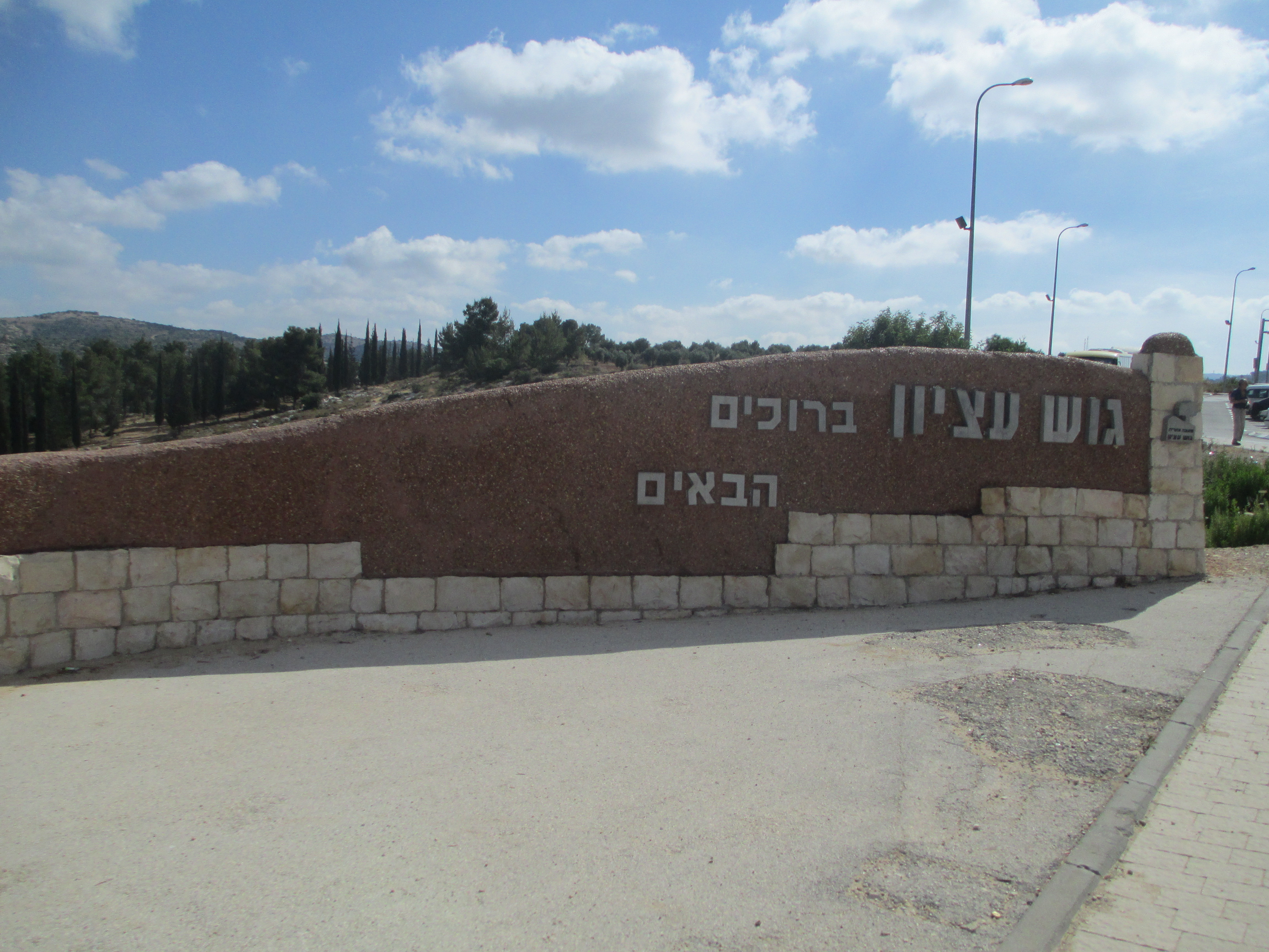 כתובת בכביש 367 בנקודת התצפית על גבעת הקרב של הל"ה